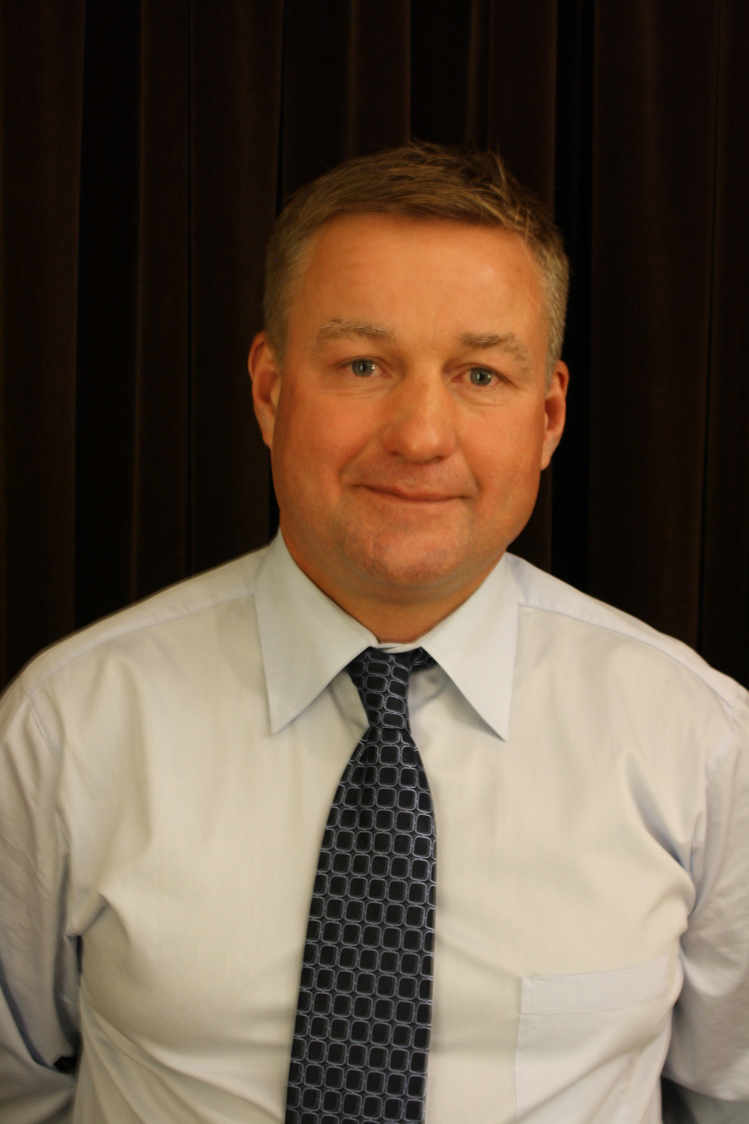 Alexey Salomatin, tränare för Ormsta HC i Riksserien 2011/12